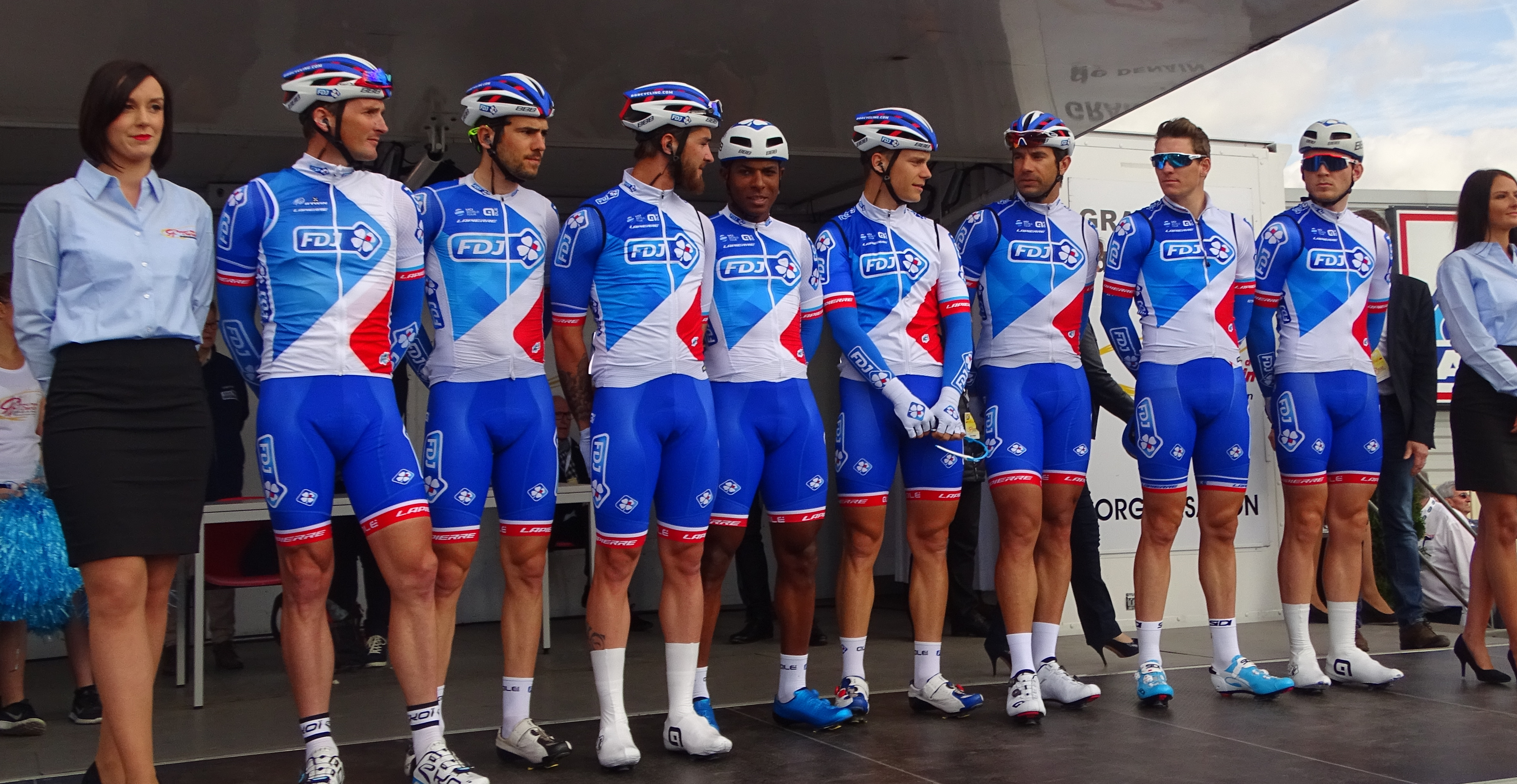 Reportage réalisé le jeudi 13 avril à l'occasion du départ et de l'arrivée du Grand Prix de Denain 2017 à Denain, Nord, Nord-Pas-de-Calais-Picardie, France.